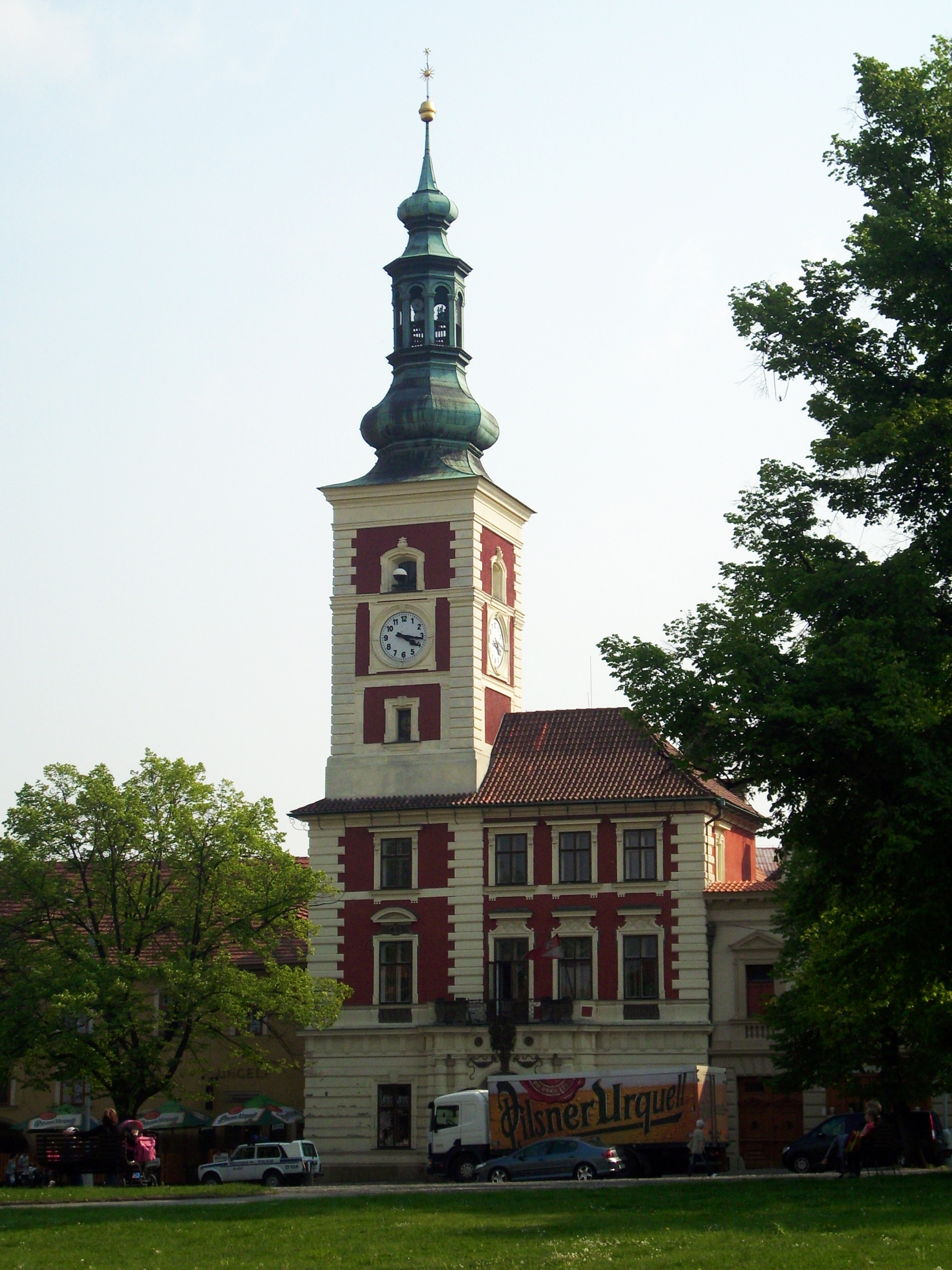 Radnice na Masarykově náměstí ve Slaném.